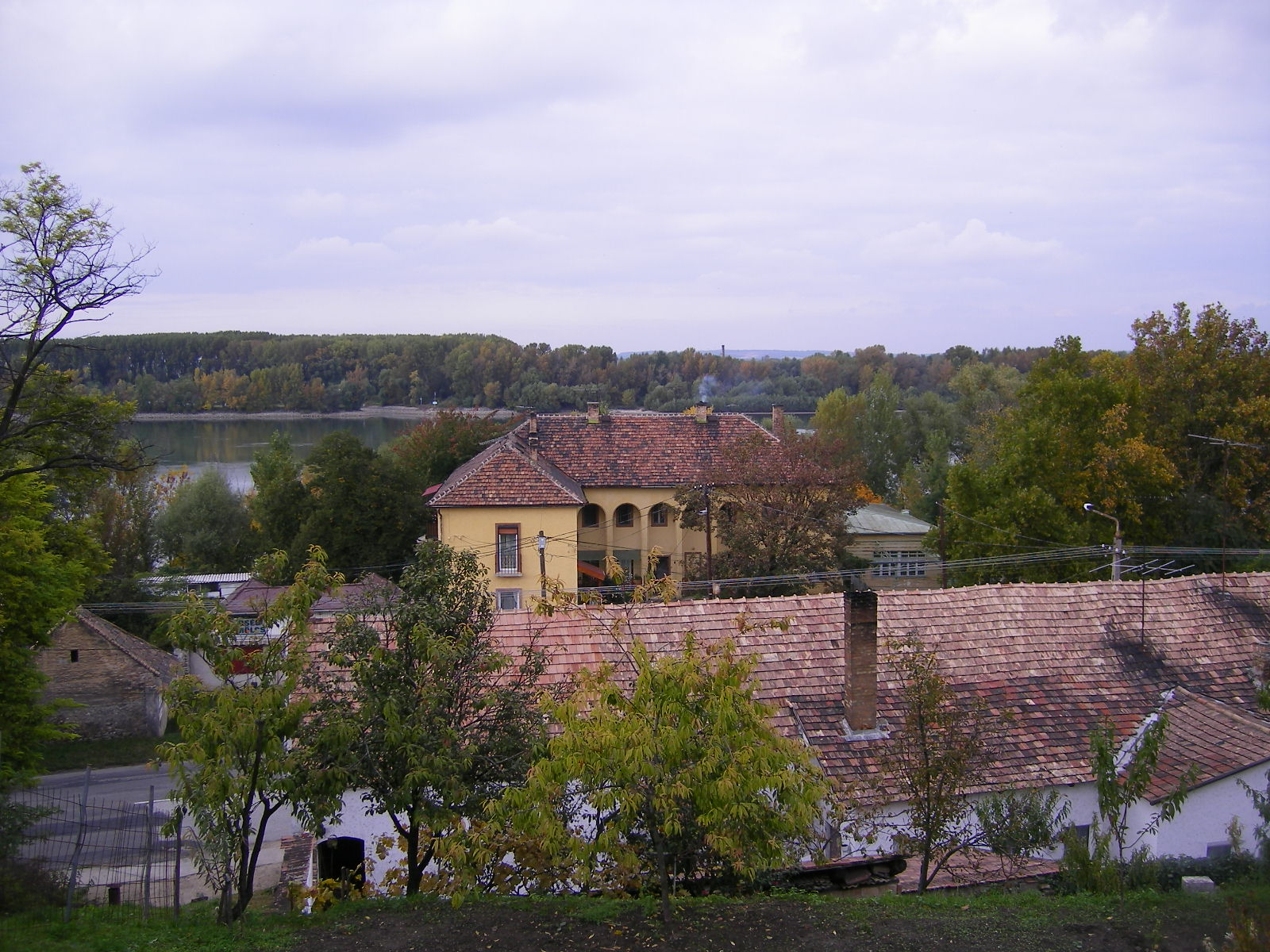 Dunaalmás - kilátás a falura a katolikus templomtól